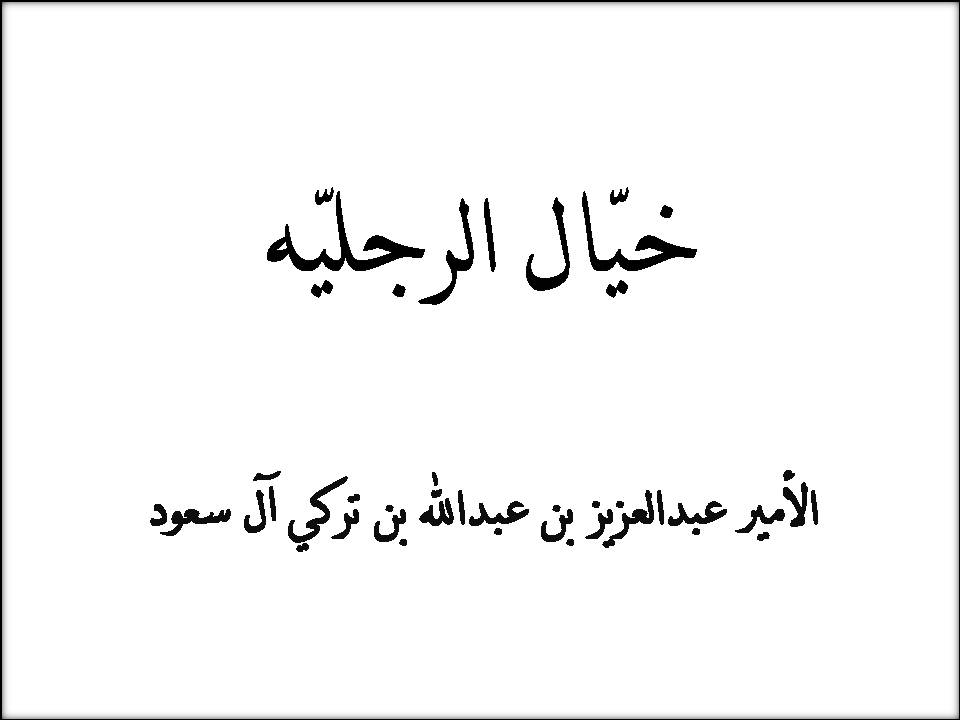 خيّال الرجليّه6